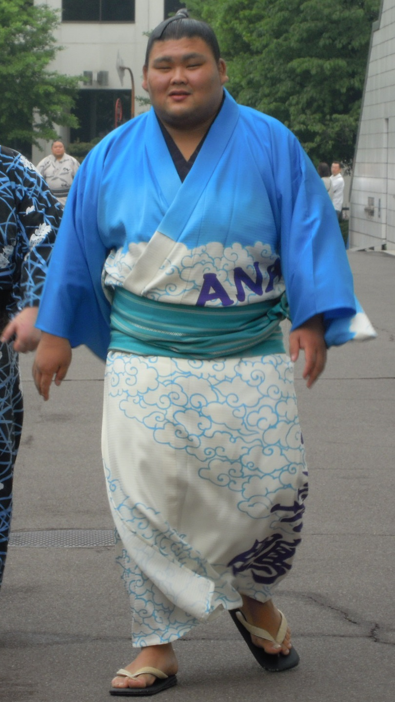 平成26年五月場所3日目、国技館入りする大喜鵬関